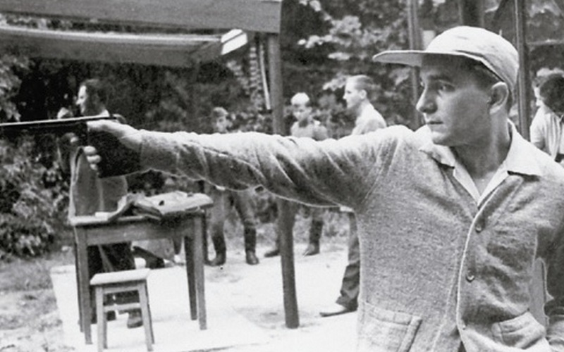 Ștefan Petrescu